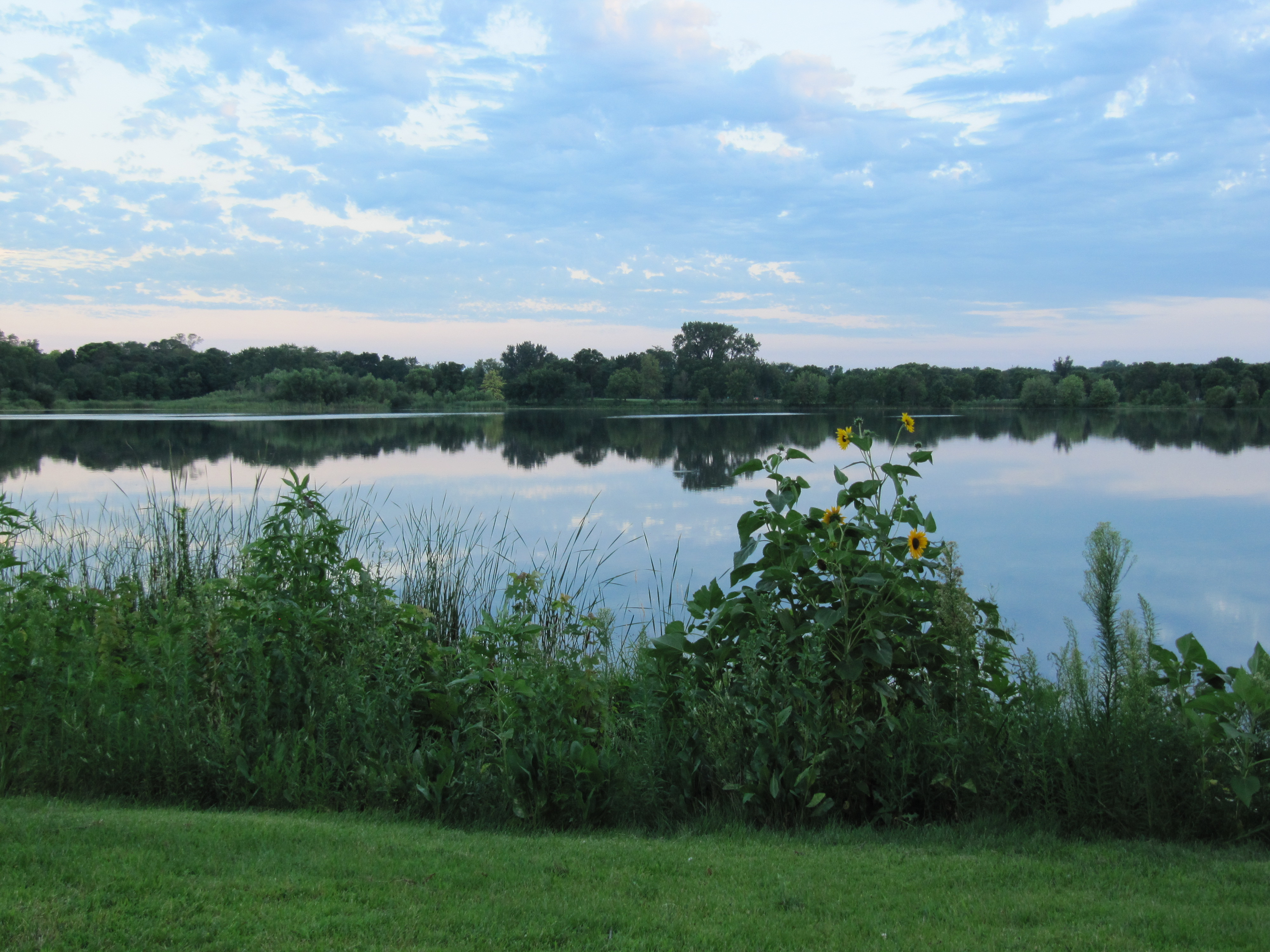 Lake Hiawatha